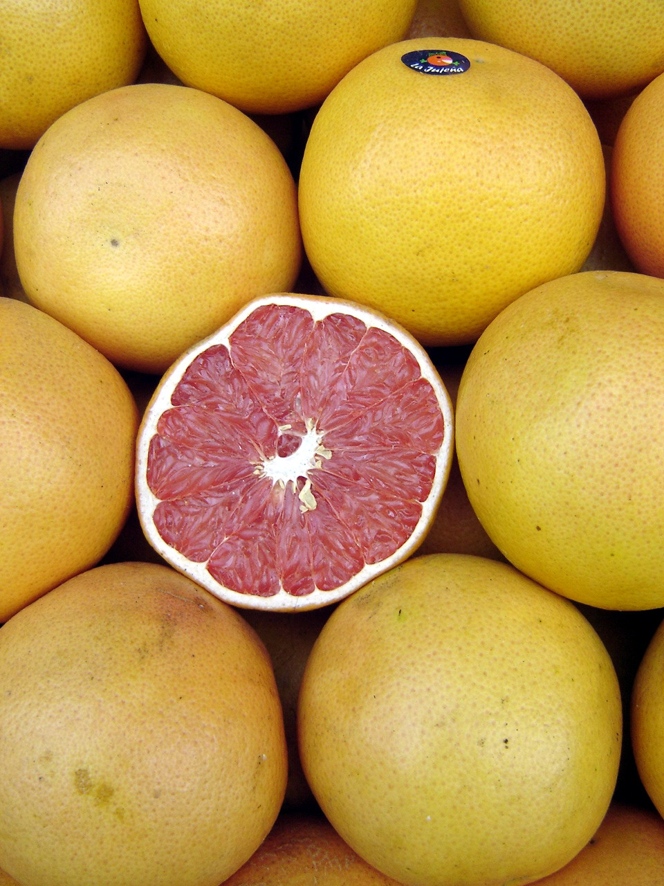 Photo taken in Buenos Aires, Argentina